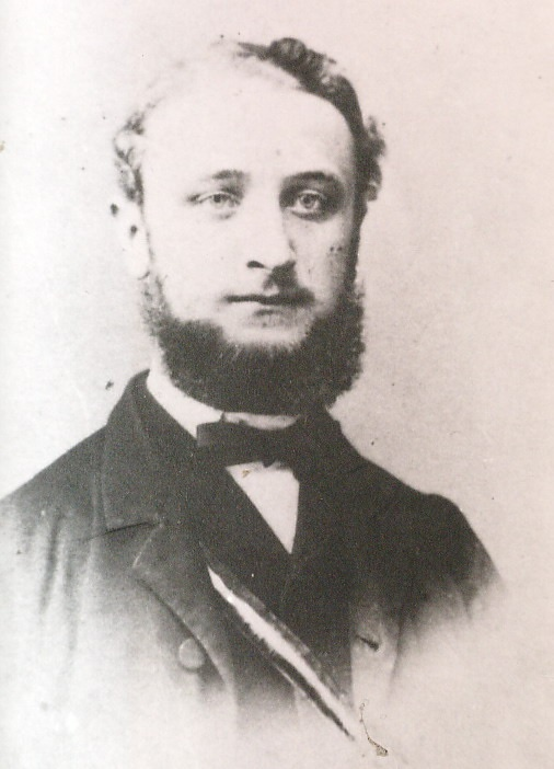 Porträtfotografie von Ottomar Müller